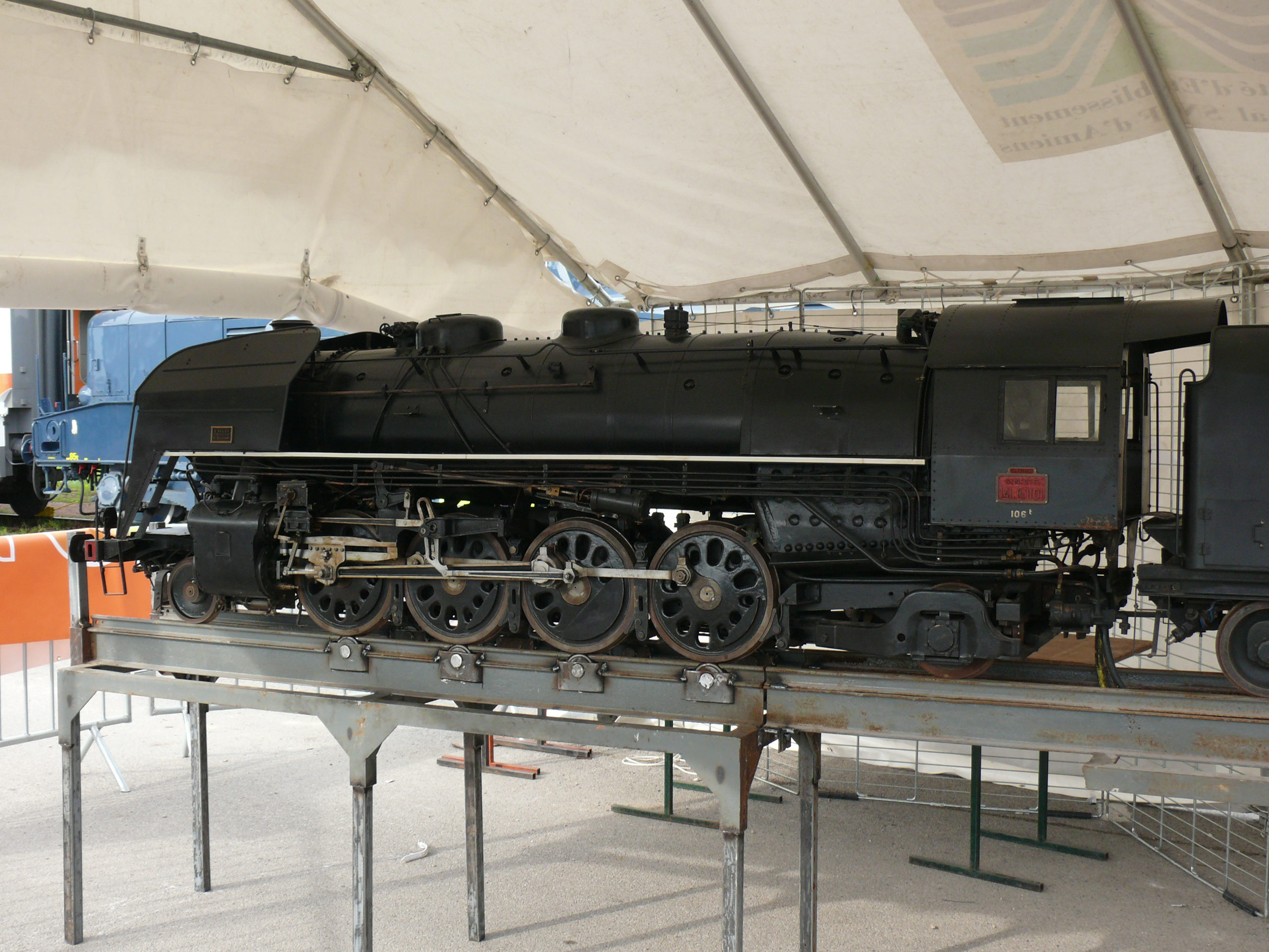 Journées portes ouvertes au dépôt de Longueau de 5 et 6 octobre 2013 :Modèle réduit de la 141 R 1101exposée à Longueau